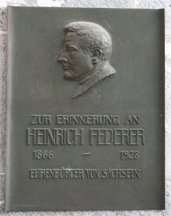 Gedenktafel für Heinrich Federer, Ehrenbürger von Sachseln (in Obwalden, Schweiz), angebracht an der Pfarrkirche in Sachseln